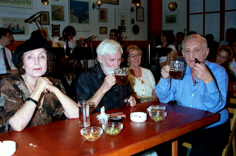 רחל אבנרי ואורי אבנרי אורחים בתכניתו של יעקב (יענקלה) אגמון "בירה ומצב רוח"